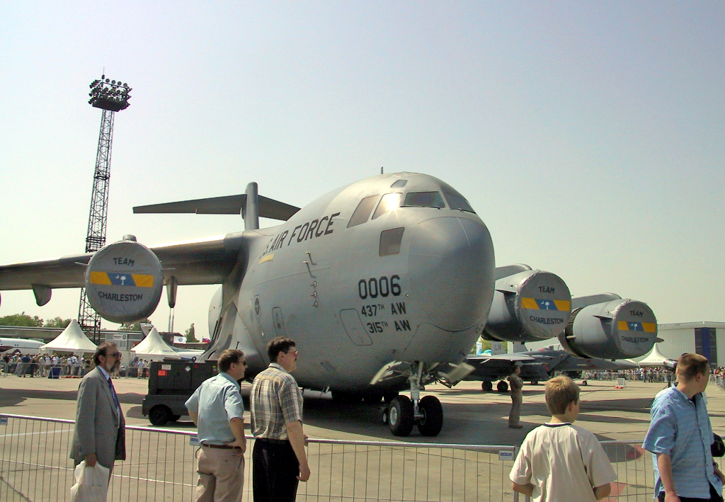 Eine C-17 Globemaster III der United States Air Force auf der ILA 2002.